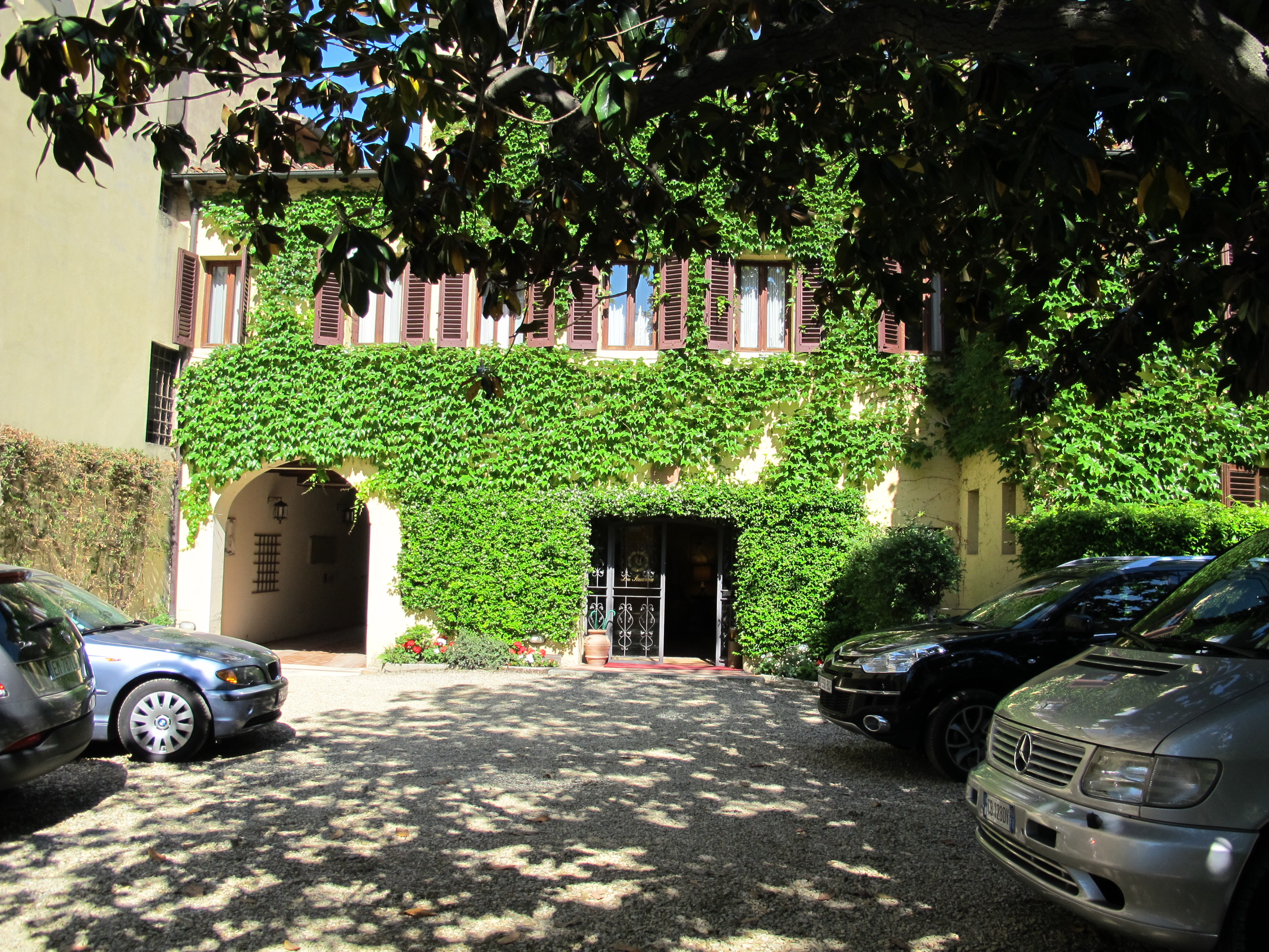 Palazzo Marzichi-Lenzi, giardino